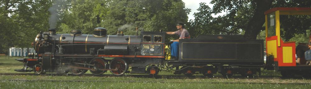 Dampflokomotive der Liliputbahn im Wiener Prate